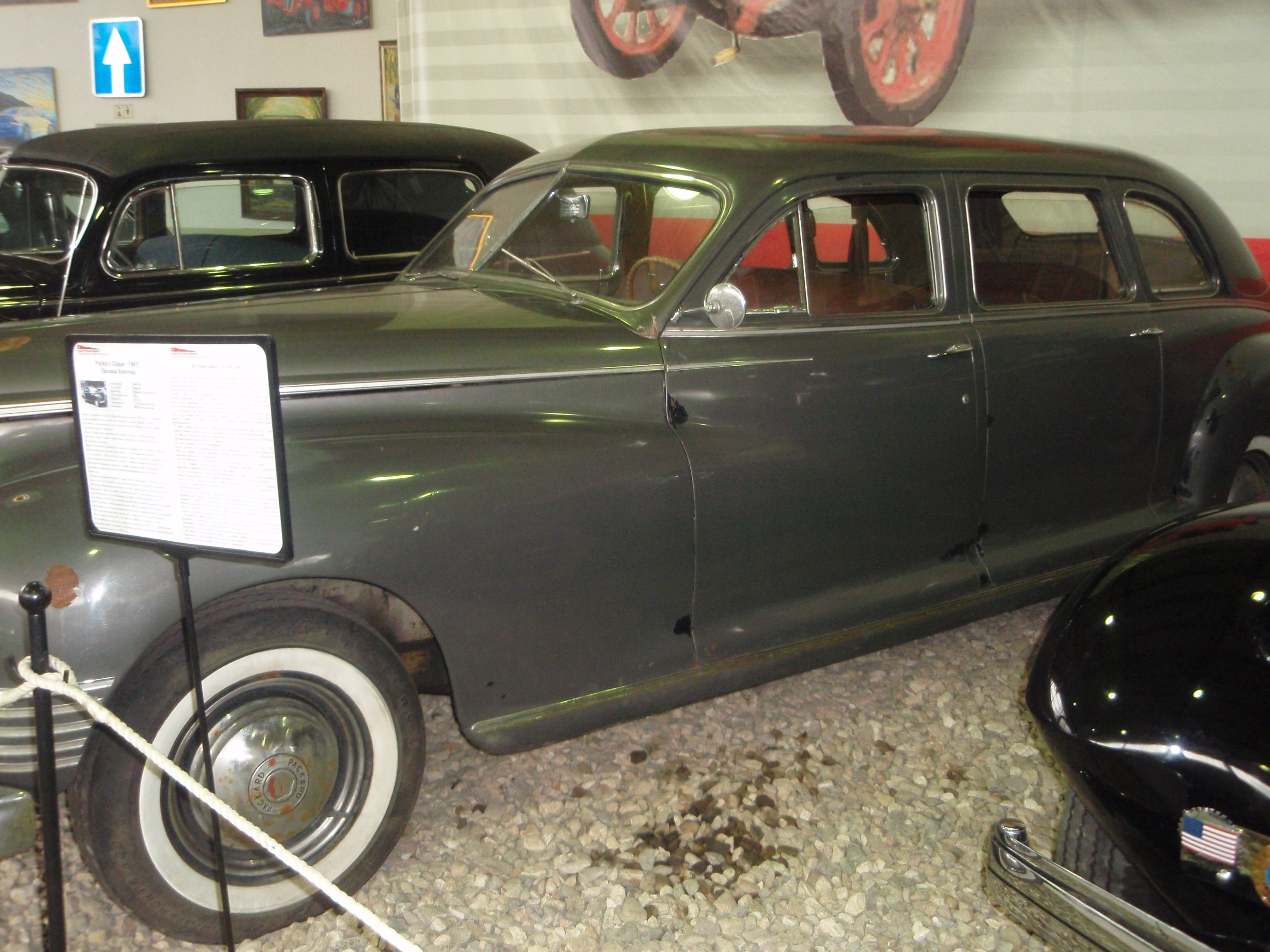 Автомобиль Packard Clipper